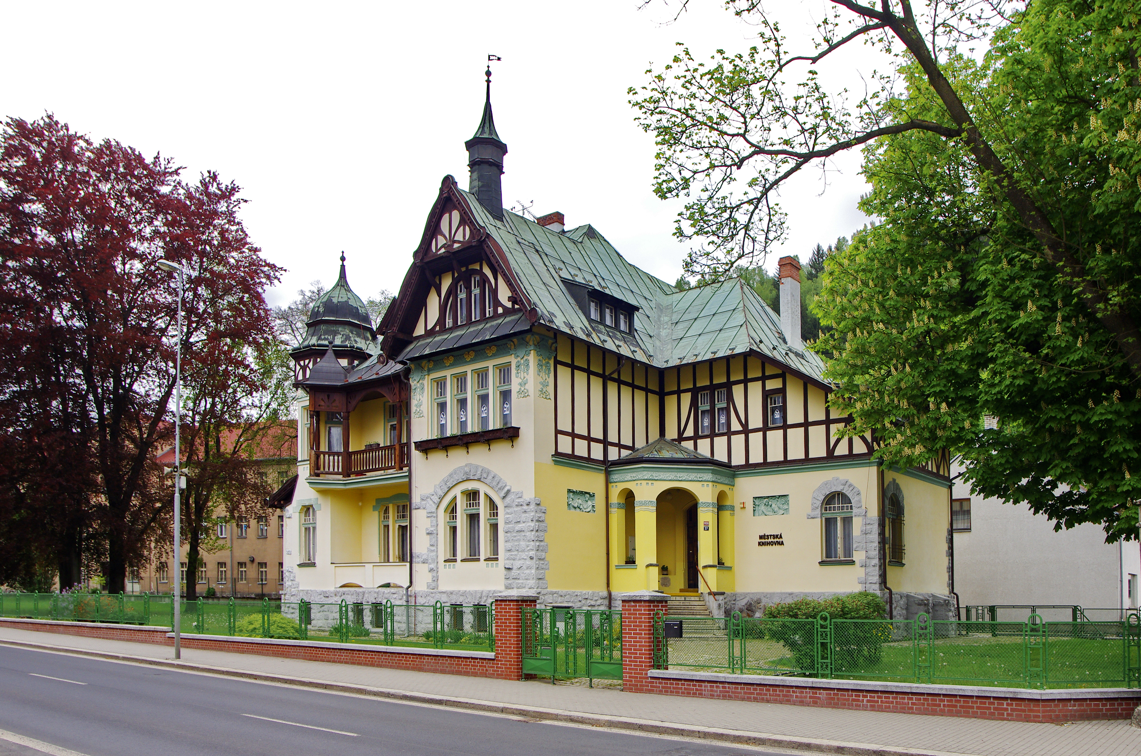 Vila továrníka Wilhelma Fuchse, Dukelská 1128/37, Kraslice (okres Sokolov).